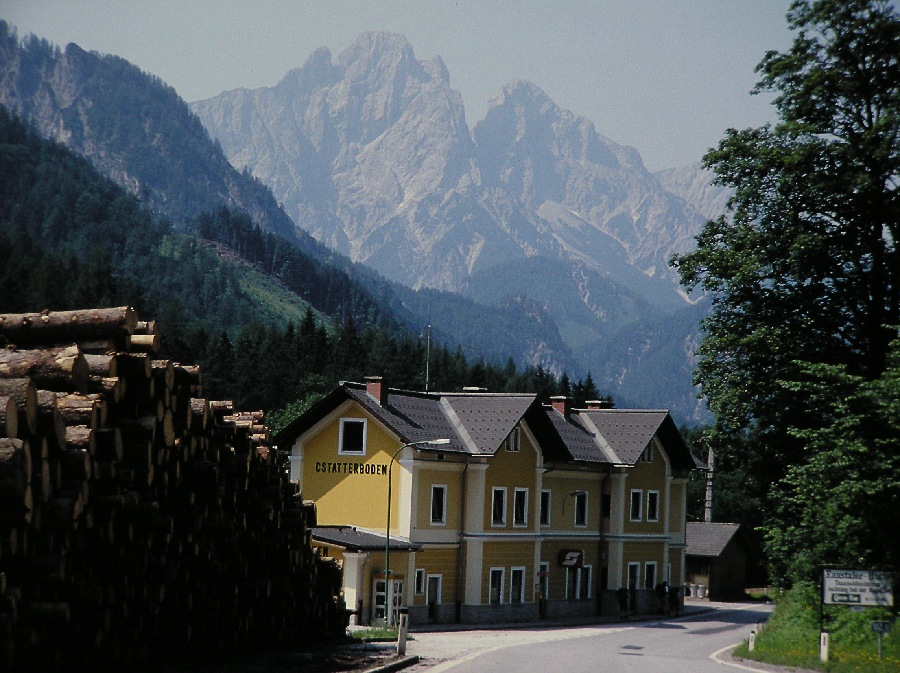 Gstatterboden im Admonter Reichensteingruppe (Gesäuse)